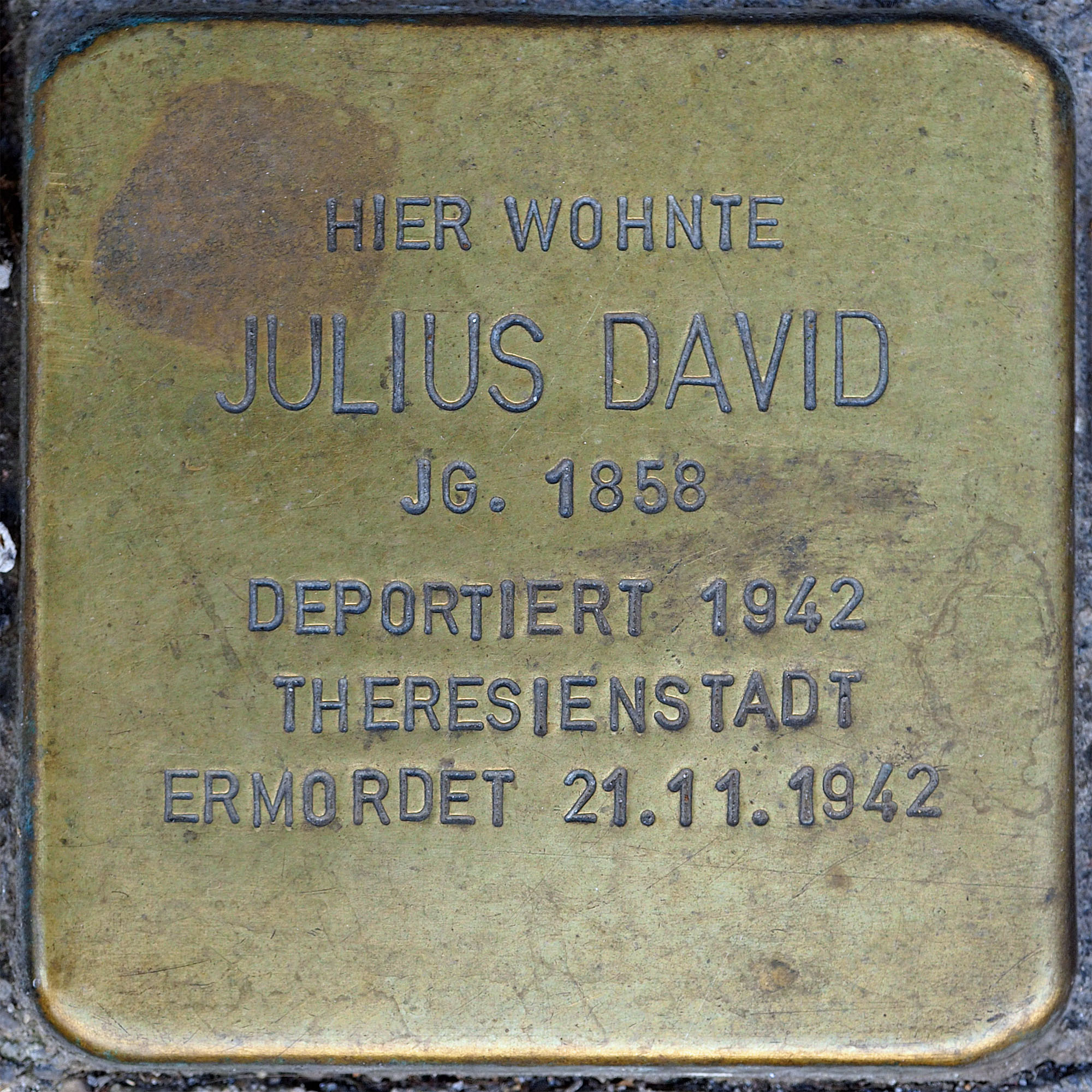 Stolpersteine Wesel: David, Julius